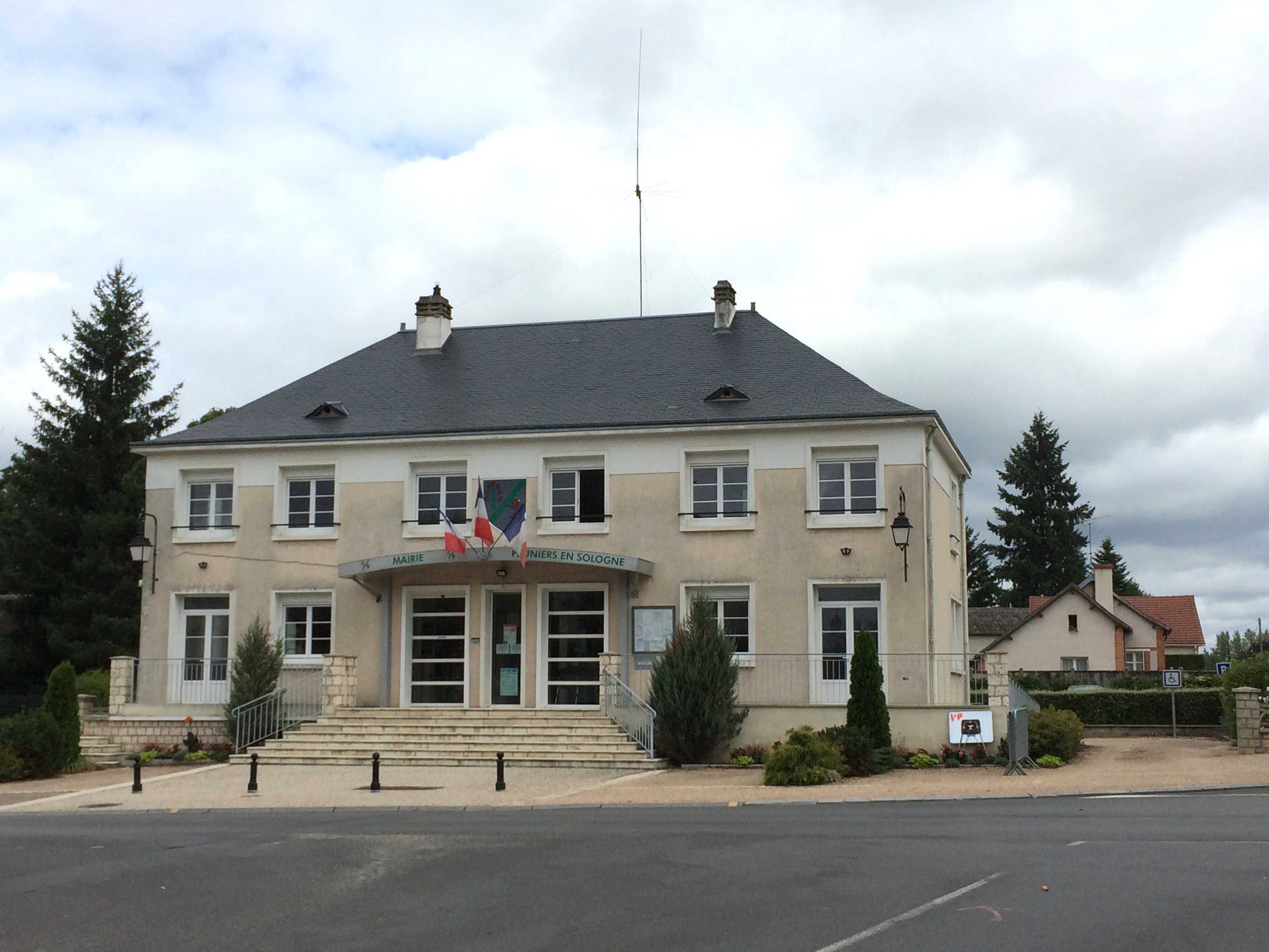 Vue de face de la mairie de la commune